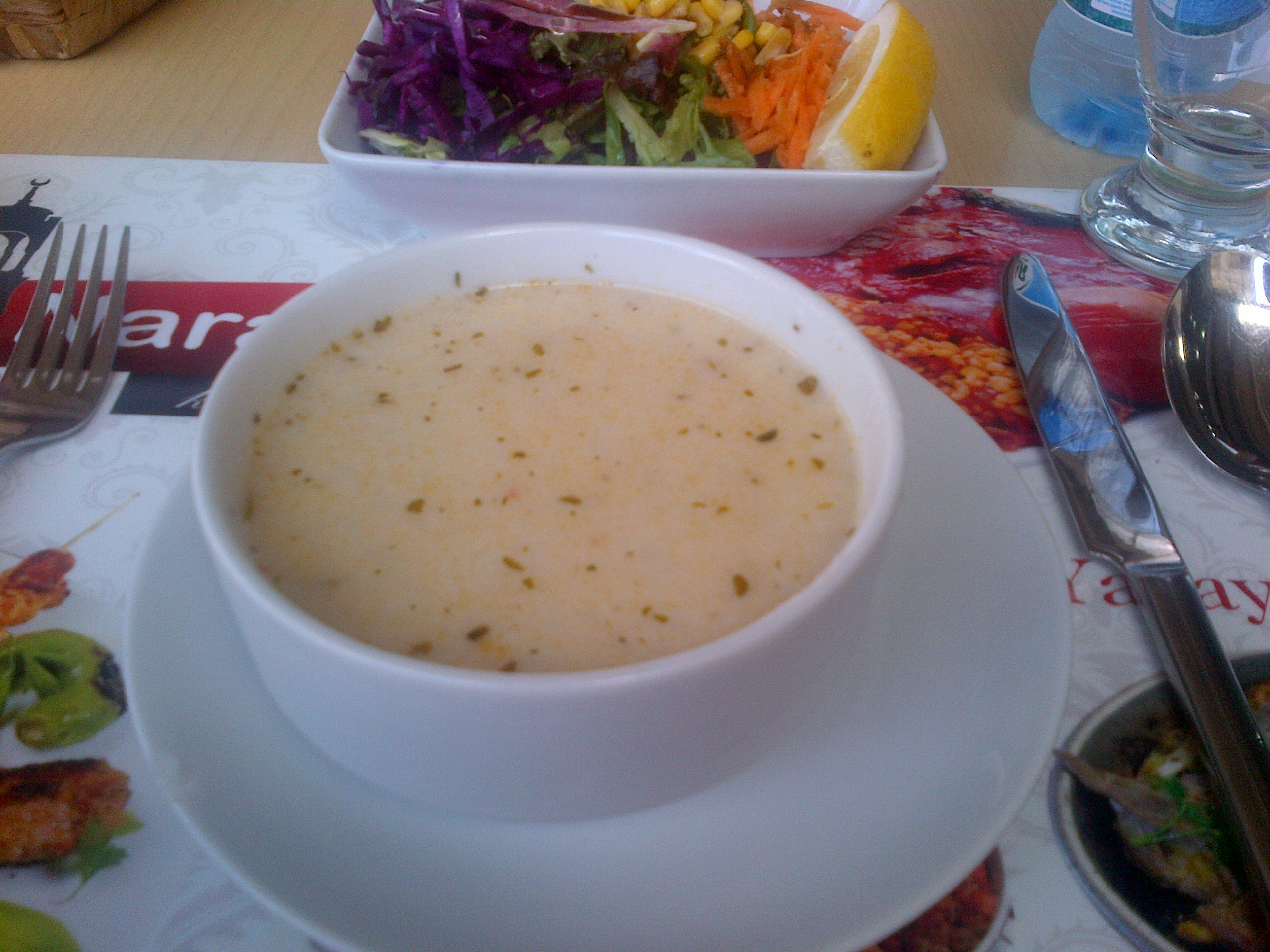 Yayla çorba es una sopa de yogurt con arroz y legumbres (garbanzo) de la cocina turca. Se toma caliente.